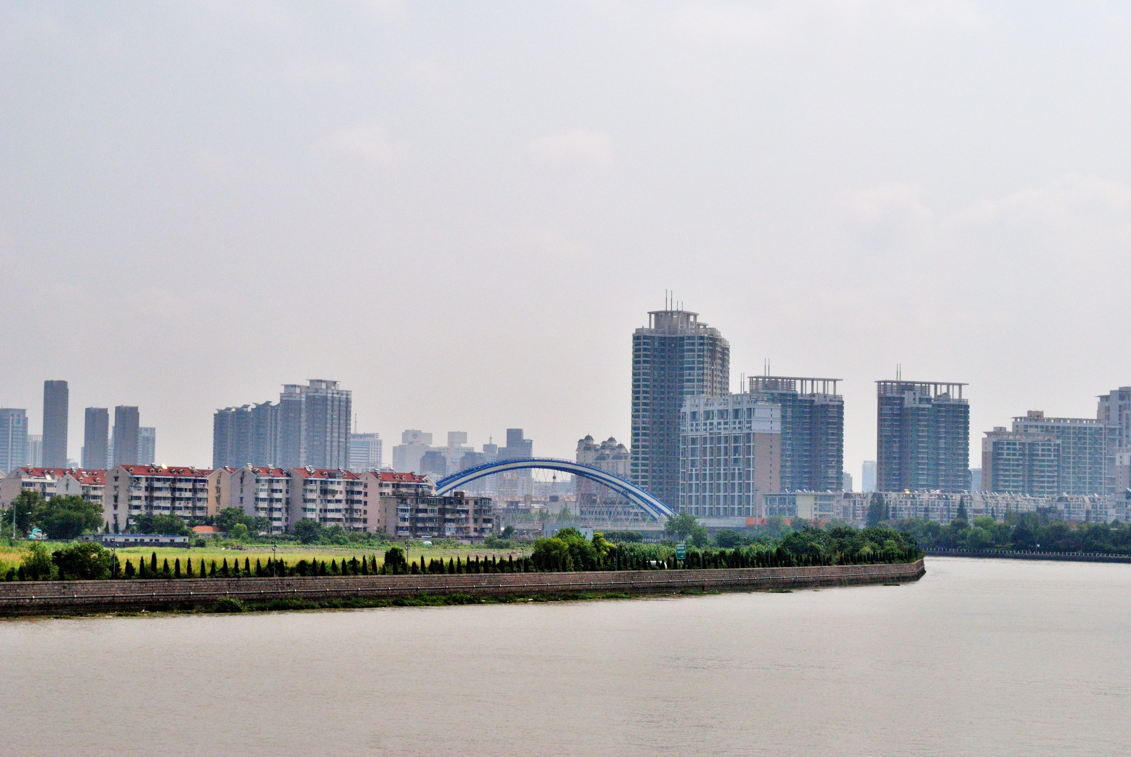 长丰桥上的宁波天际线